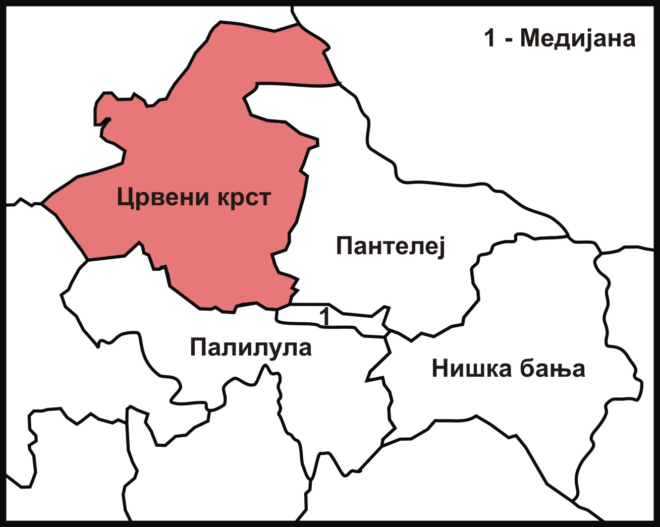 Gradska opština Crveni krst.